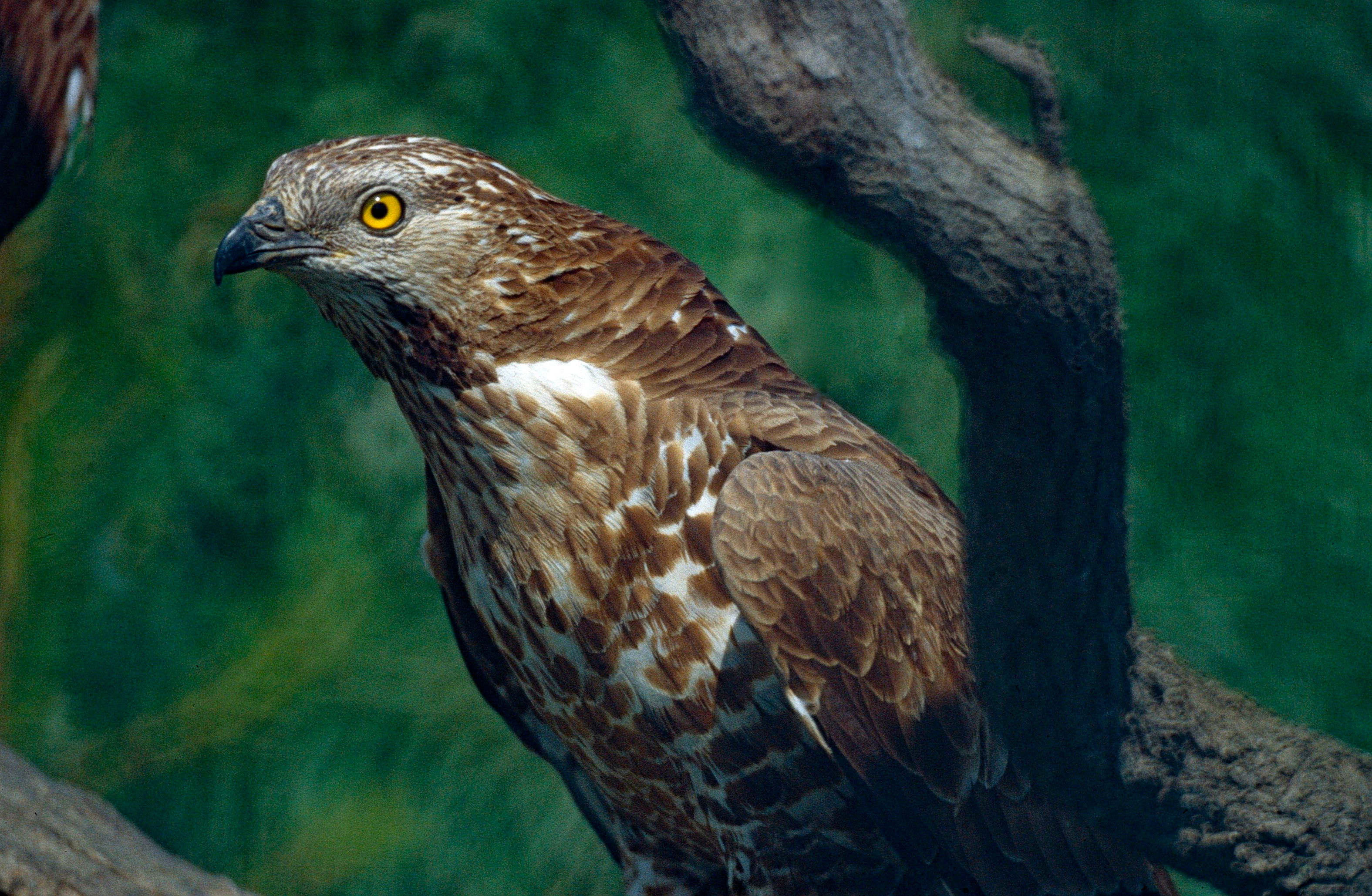 Parc Ornithologique de Pont de Gau, Les Saintes-Maries de la Mer, Bouches-du-Rhône, FRANCE Scanned Slide from 2000